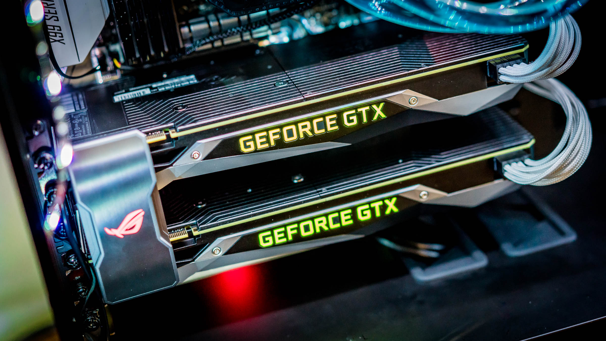 Eddig a legerősebb GTX az Nvidiától